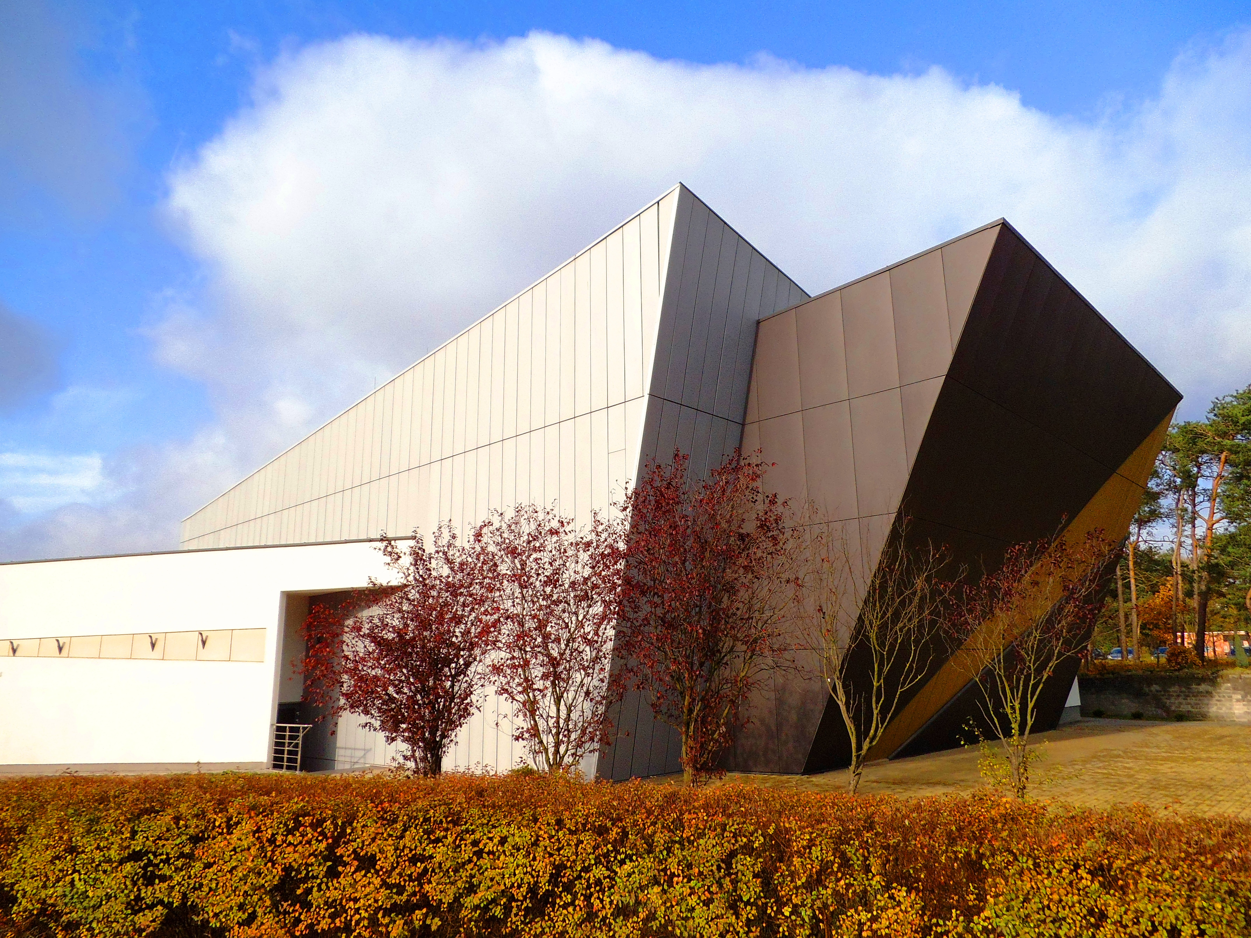 Klub Studencki Od Nowa w Toruniu6